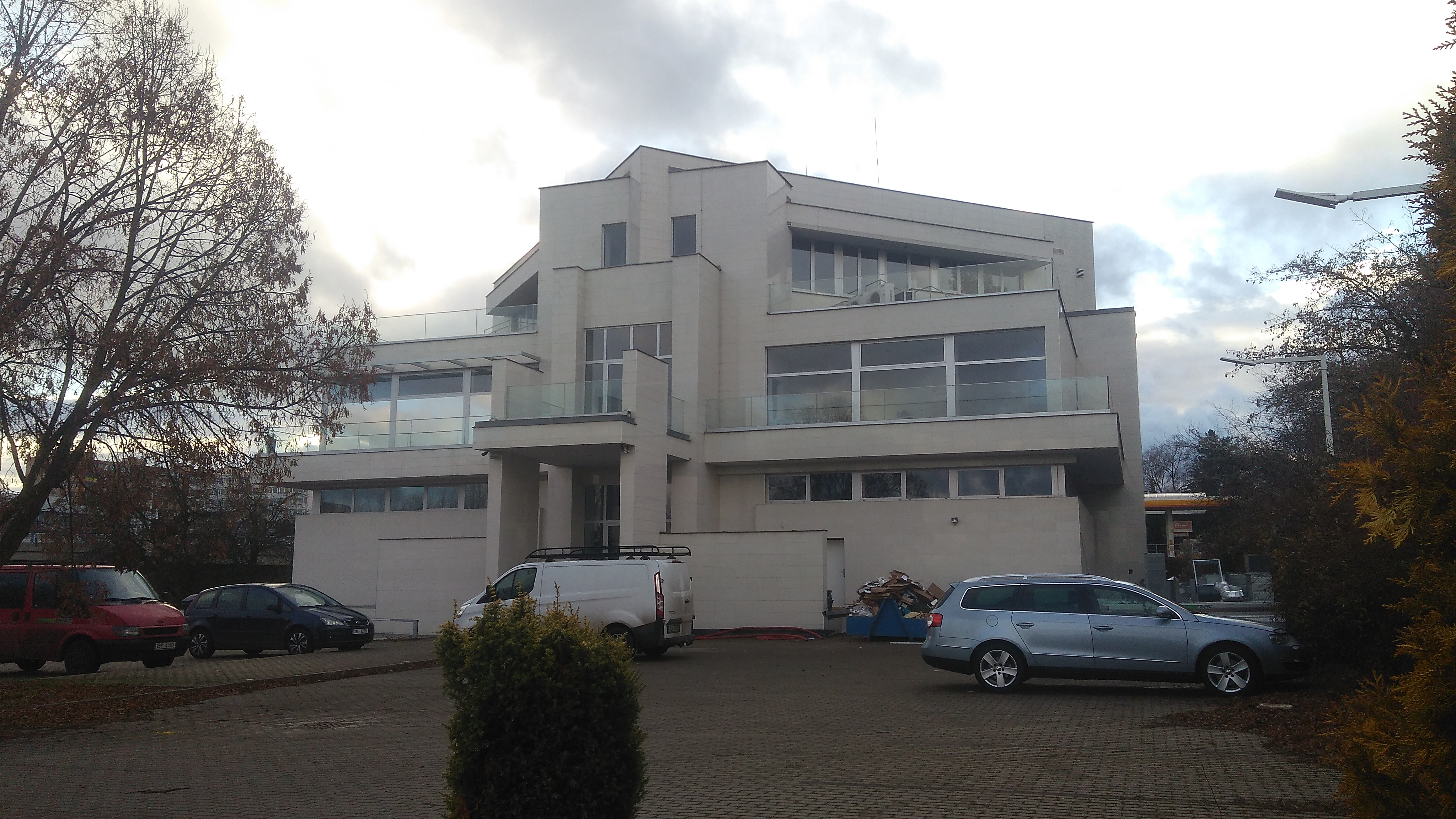 parkoviště a Galerie Kladno